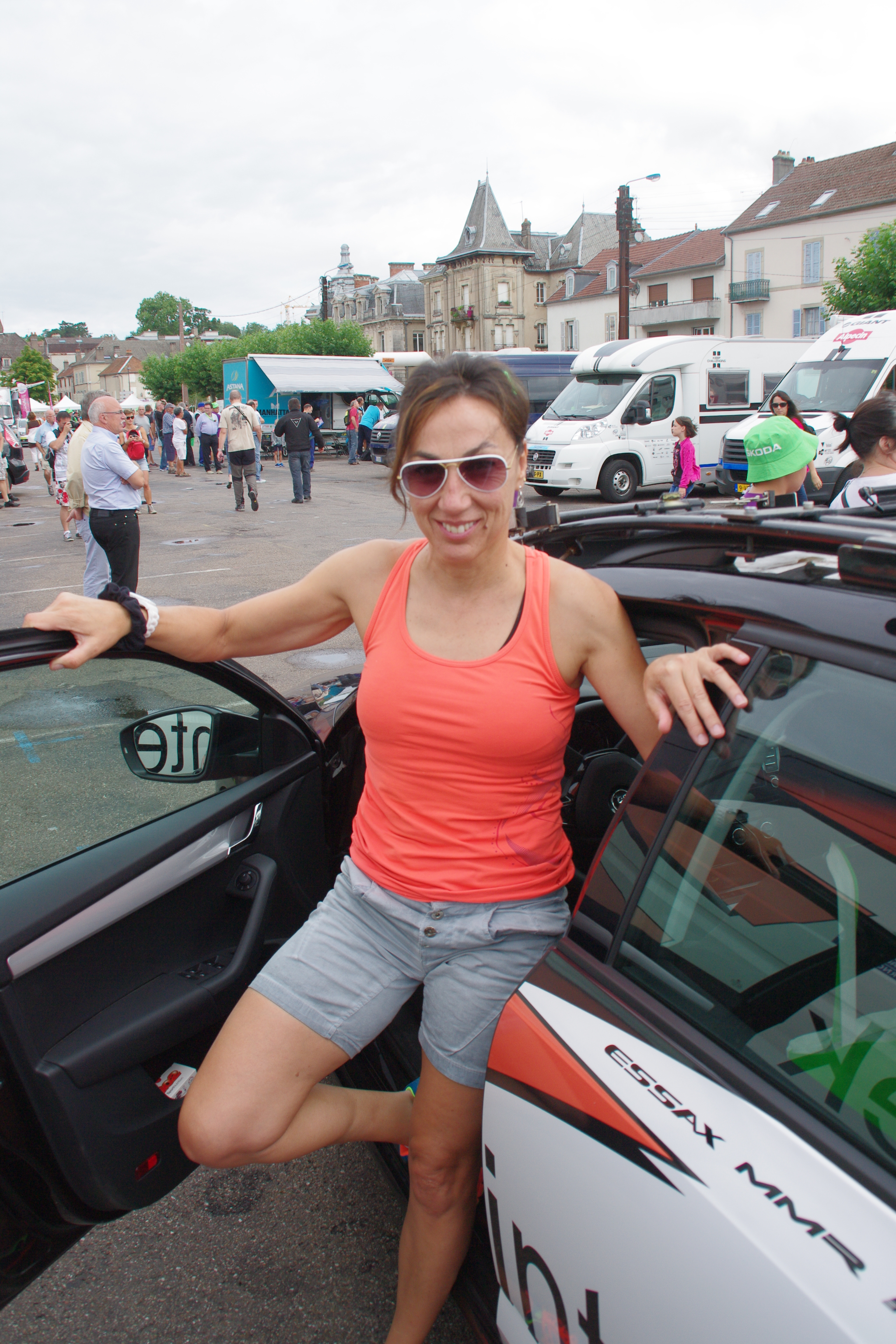 Aout 2015, Route de FRANCE Cycliste Féminine à VESOUL